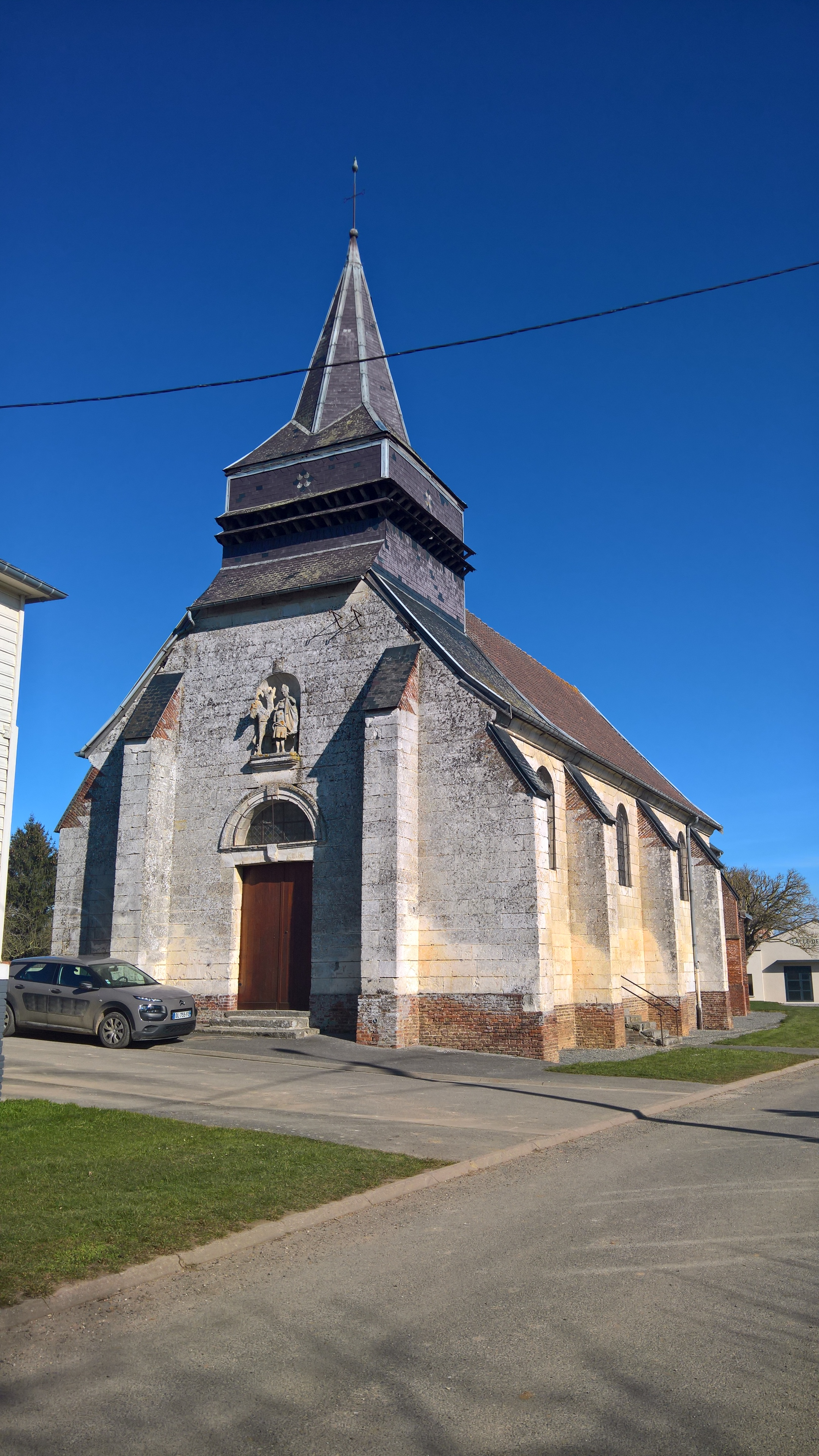 Moyencourt-lès-Poix - Eglise Saint-Martin